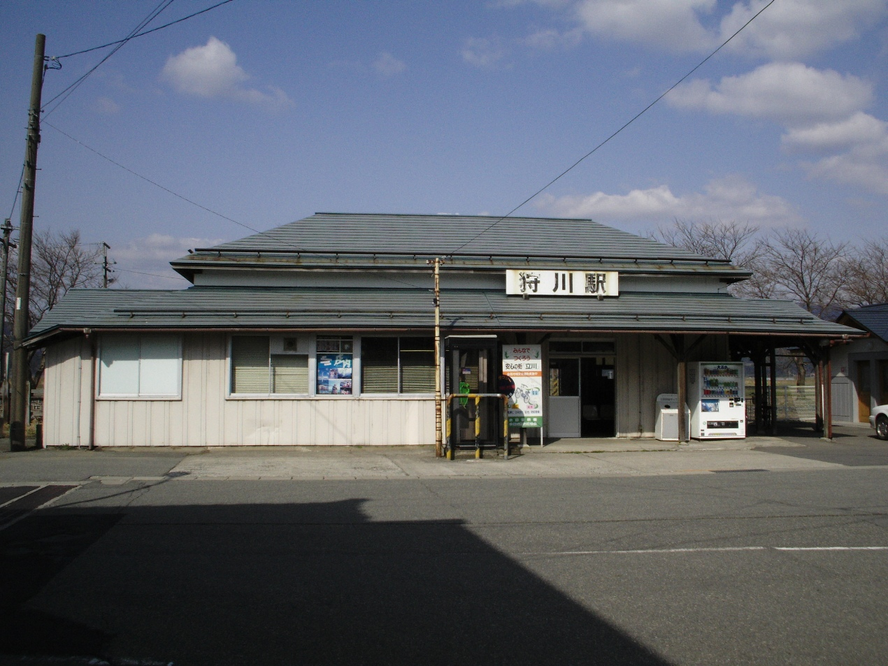 Karikawa Station, Shōnai, Yamagata, Japan